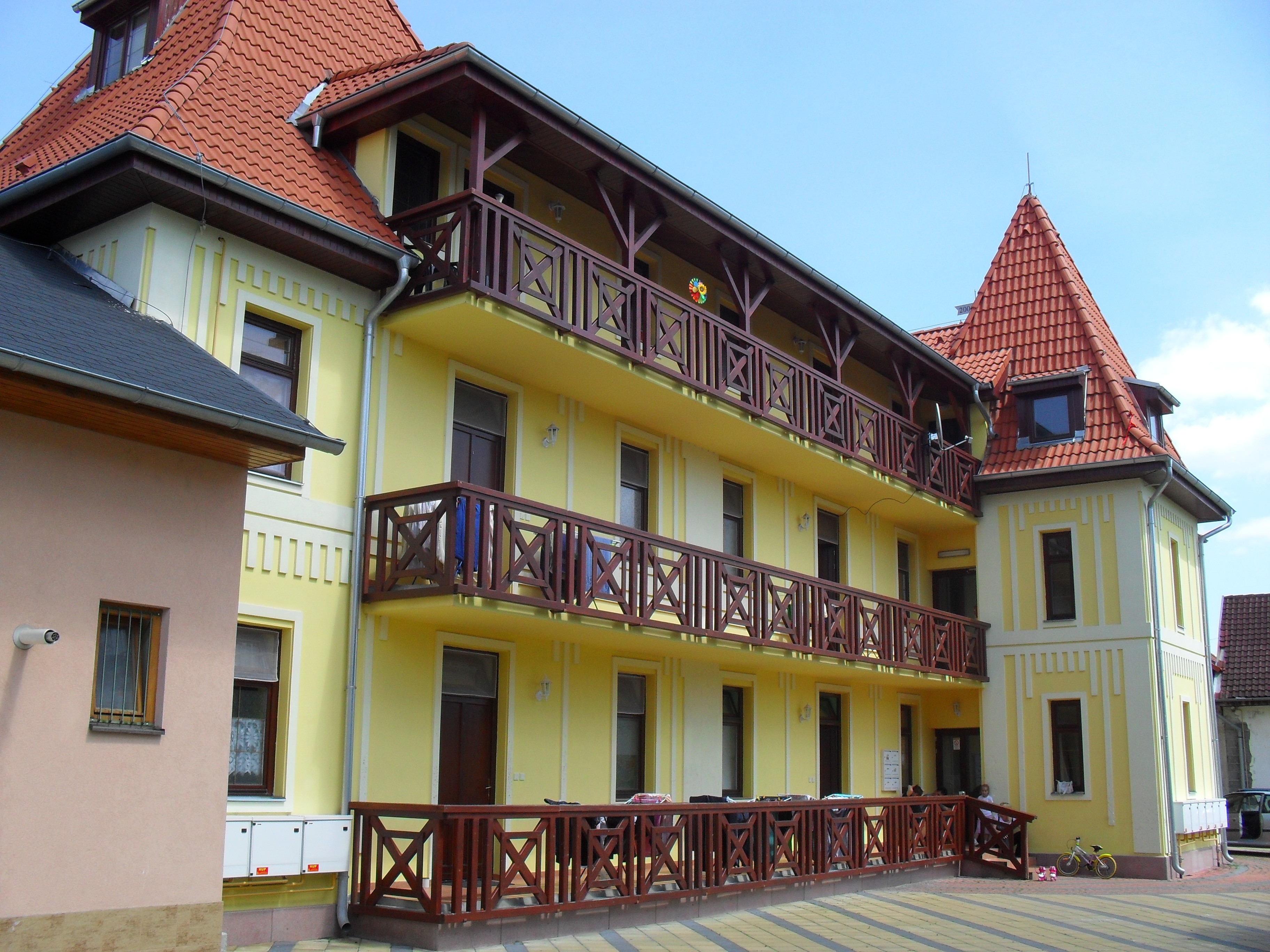 Gúta - Piac tér